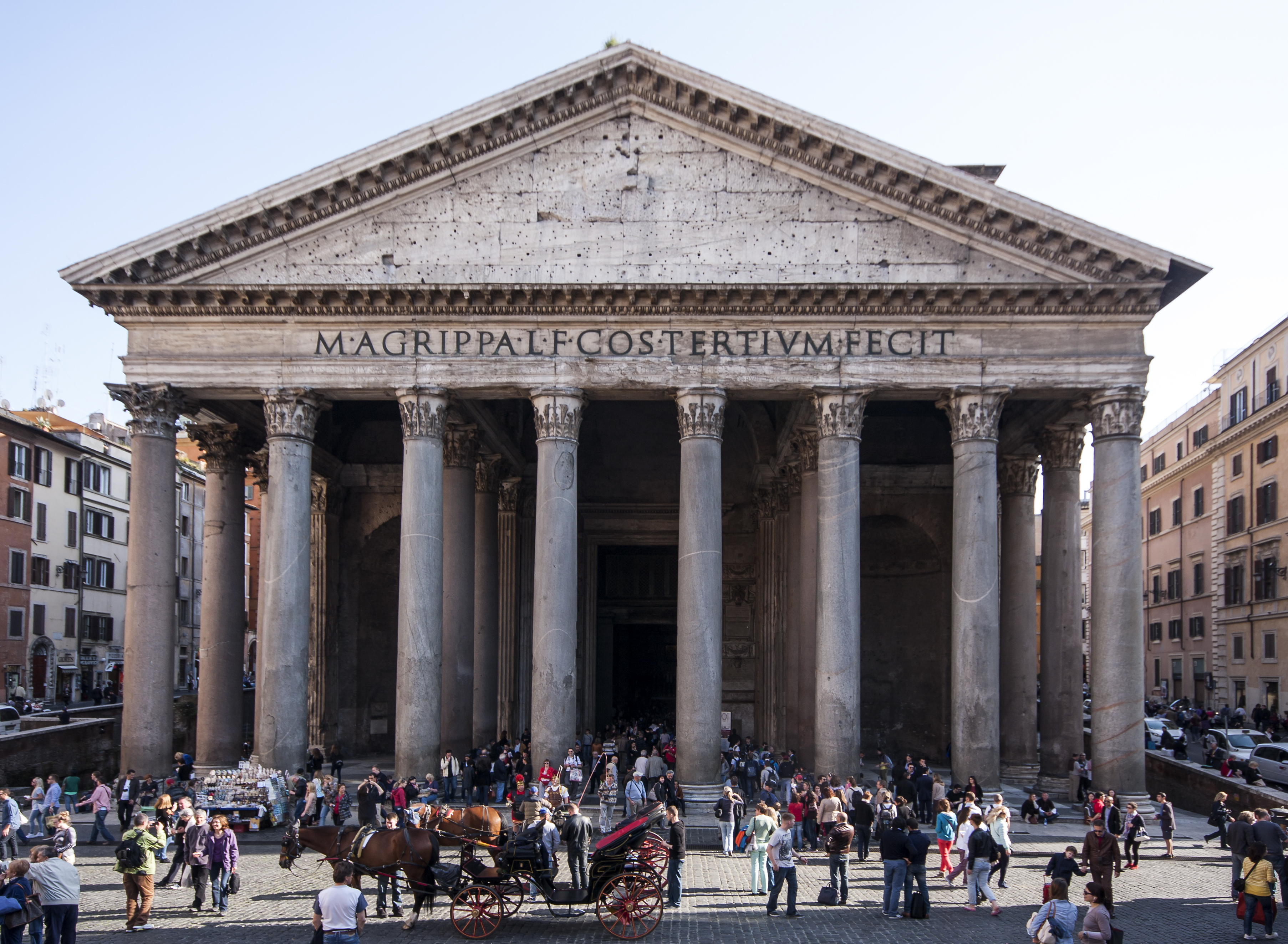 Pantheon i Rom, ursprungligen ett antikt polyteistiskt tempel och sedan 600-talet en romersk-katolsk kyrka.